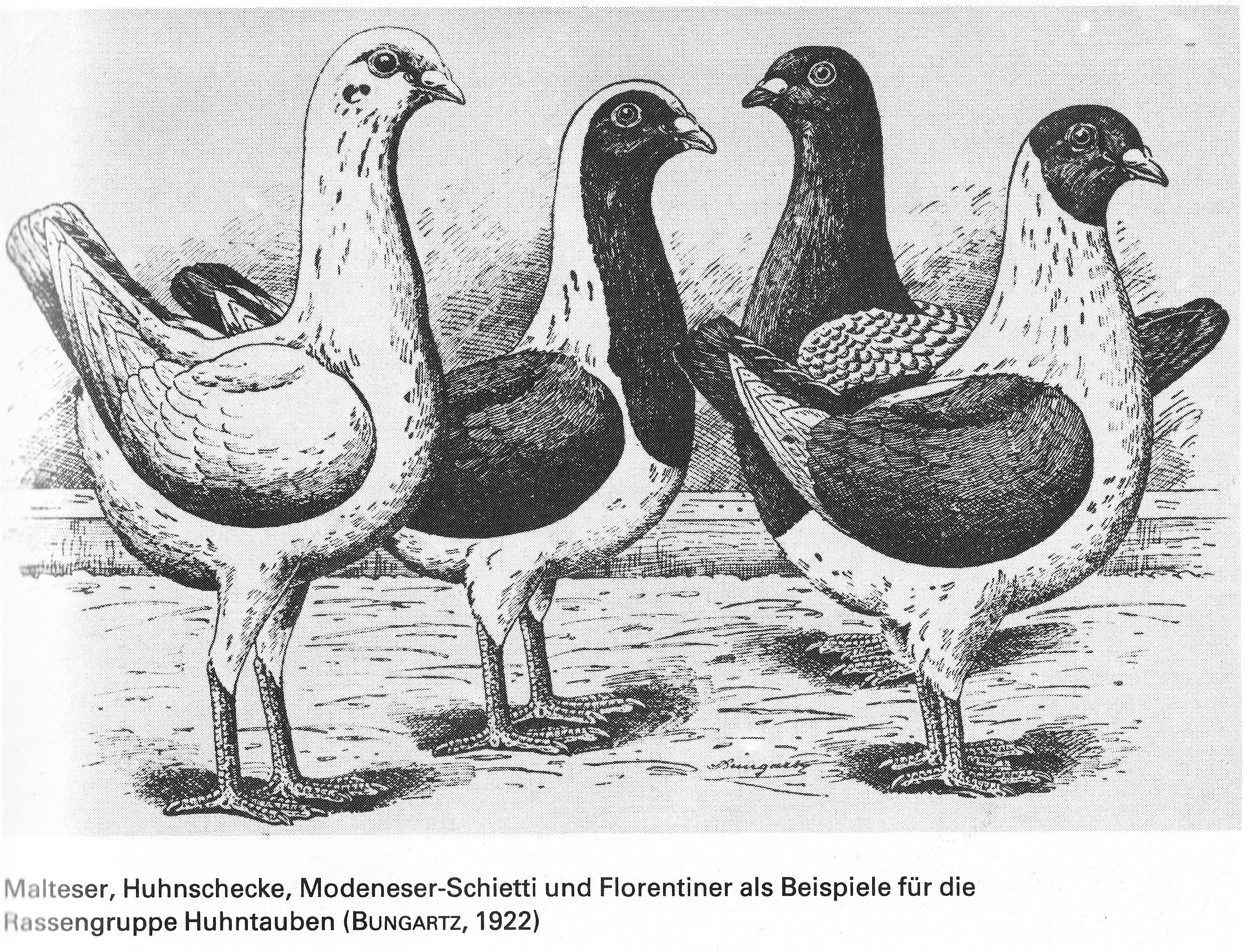 Malteser, Huhnschecke, Modeneser-Schietti und Florentiner als Beispiele für die Rassengruppe Huhntauben (BUNGARTZ, 1922)